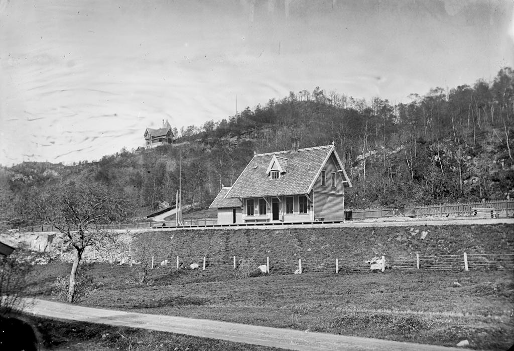 Fjøsanger stasjon på Vossebanen